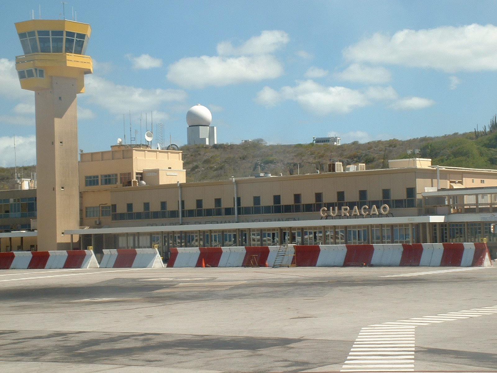 Curacao airport